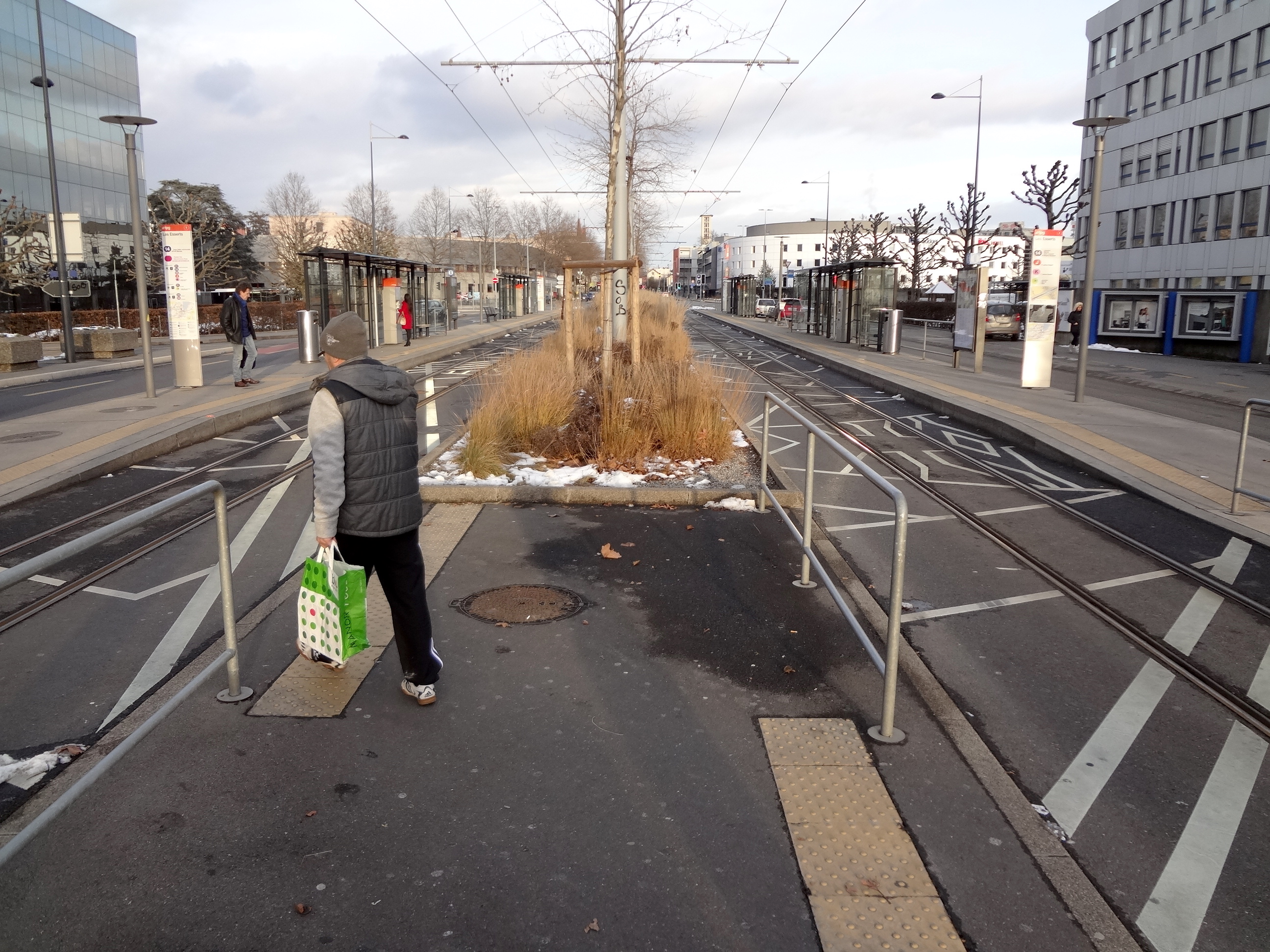 Art contemporain. Trame et tram de Silvie Defraoui (2013). Arrêt Les Esserts à Lancy.